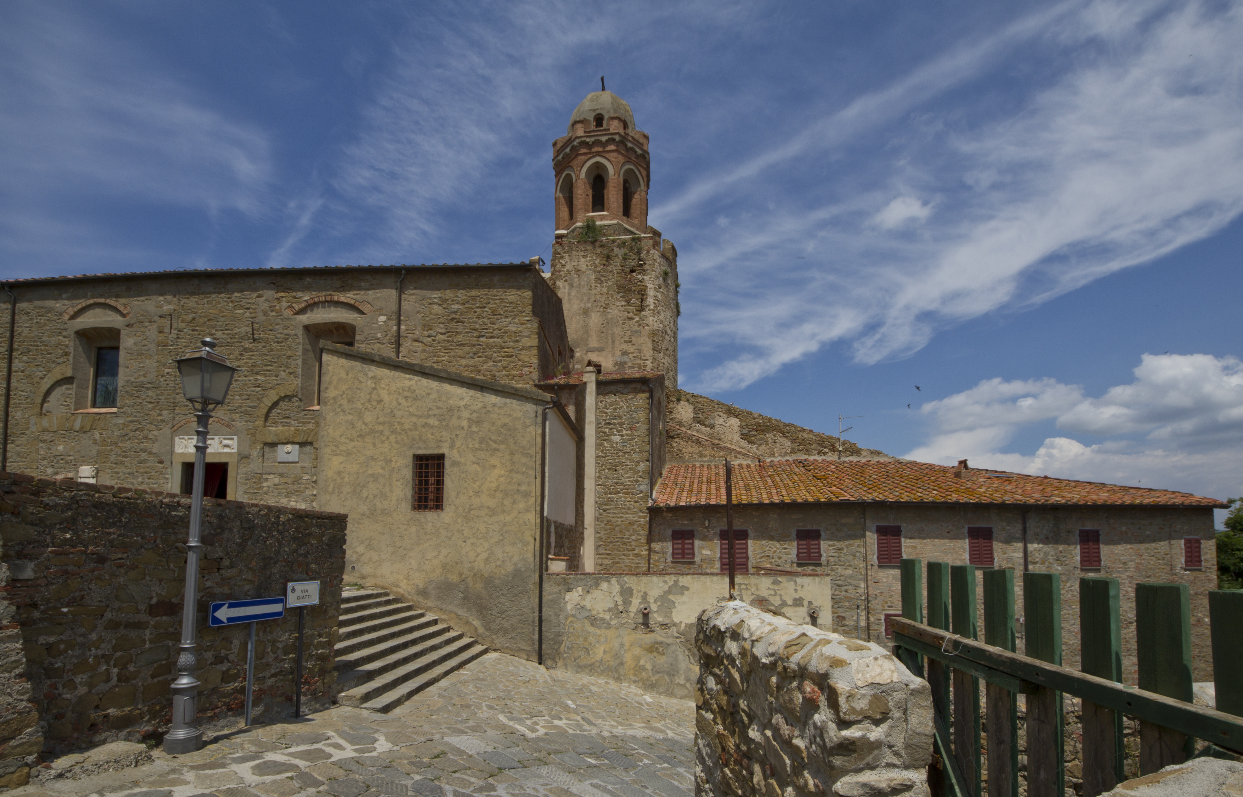 S. Giovanni Battista, Castiglione della Pescaia Grosseto, Italy